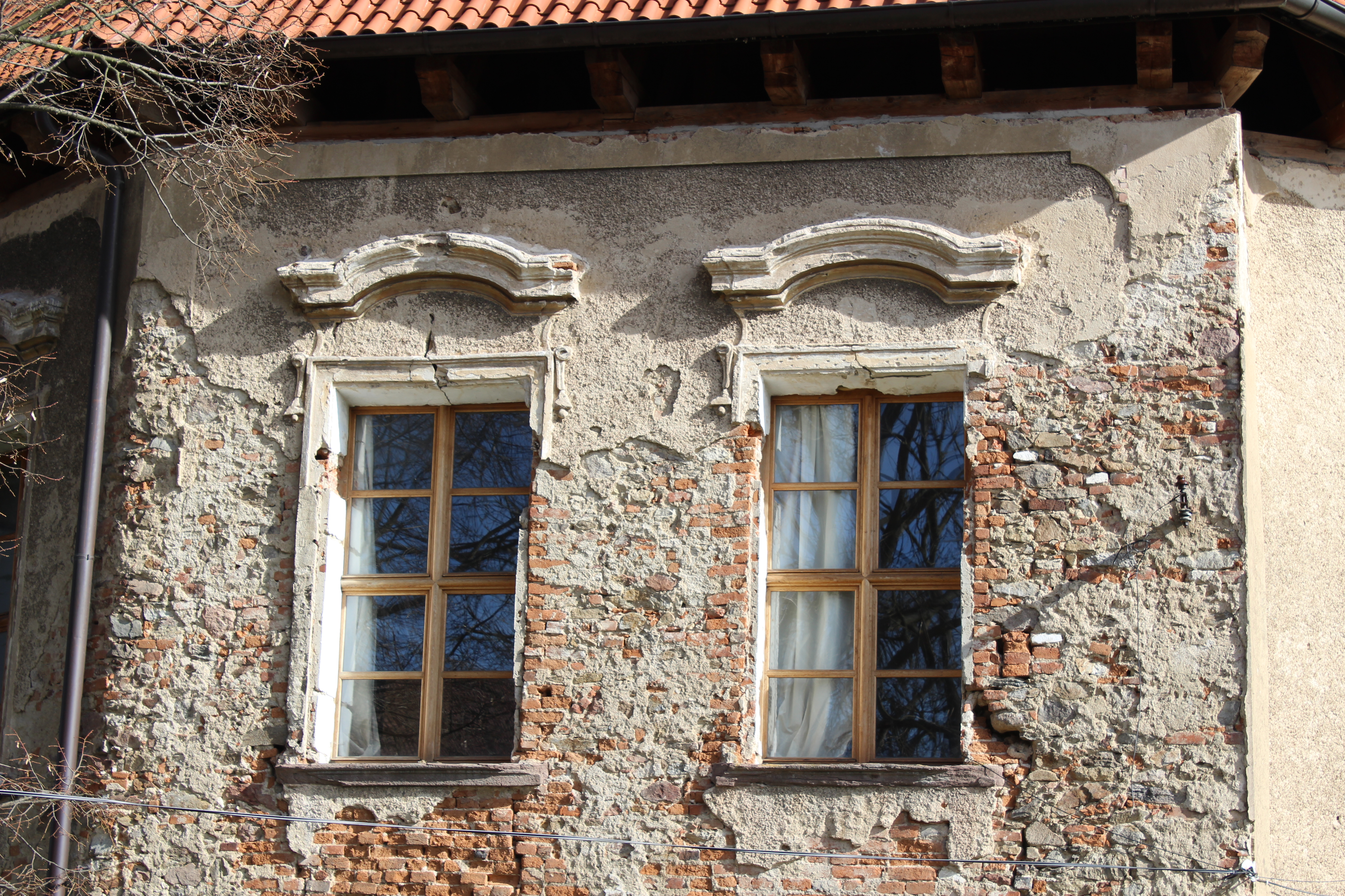 Vodní tvrz Popovice (okres Benešov) Pohled na okna vstupního rizalitu západního křídla.